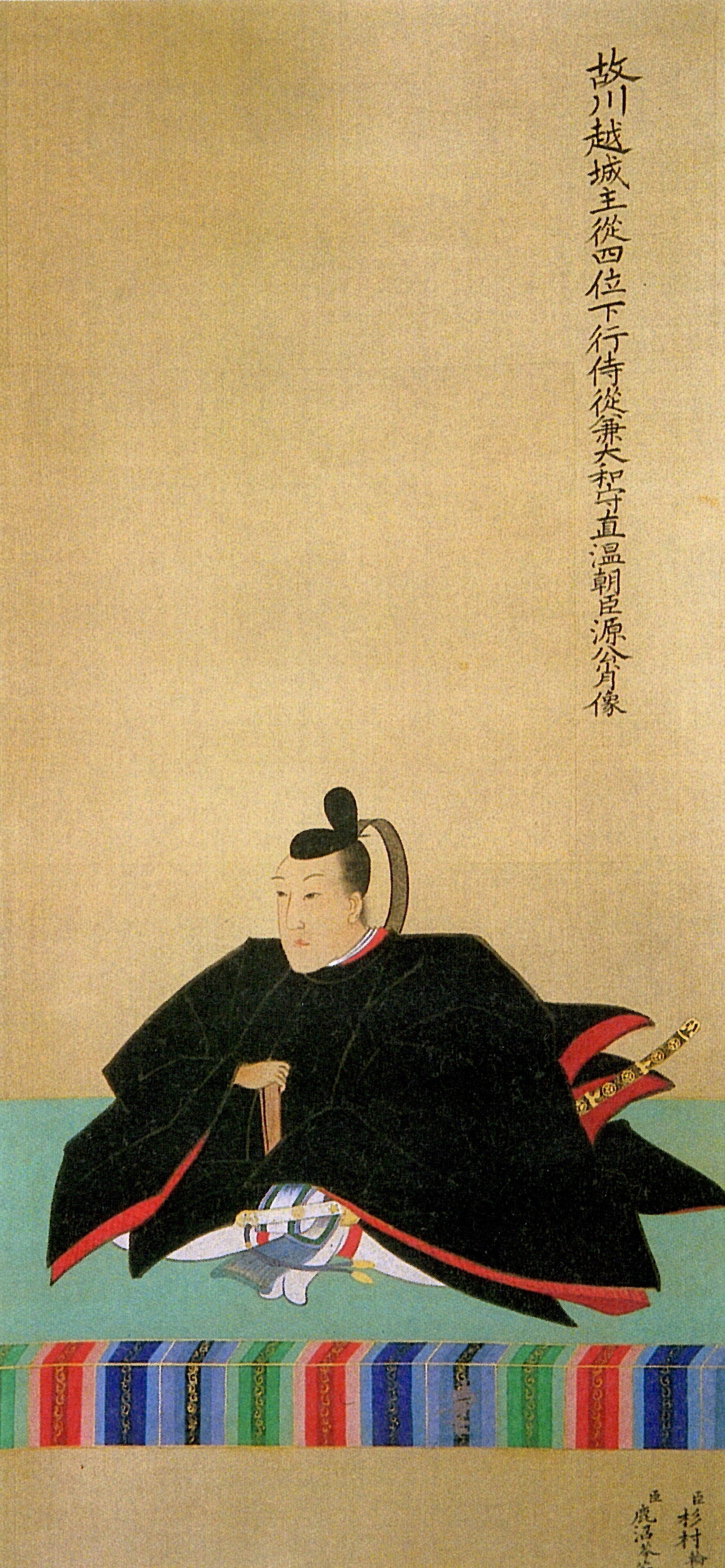 松平直温の肖像。